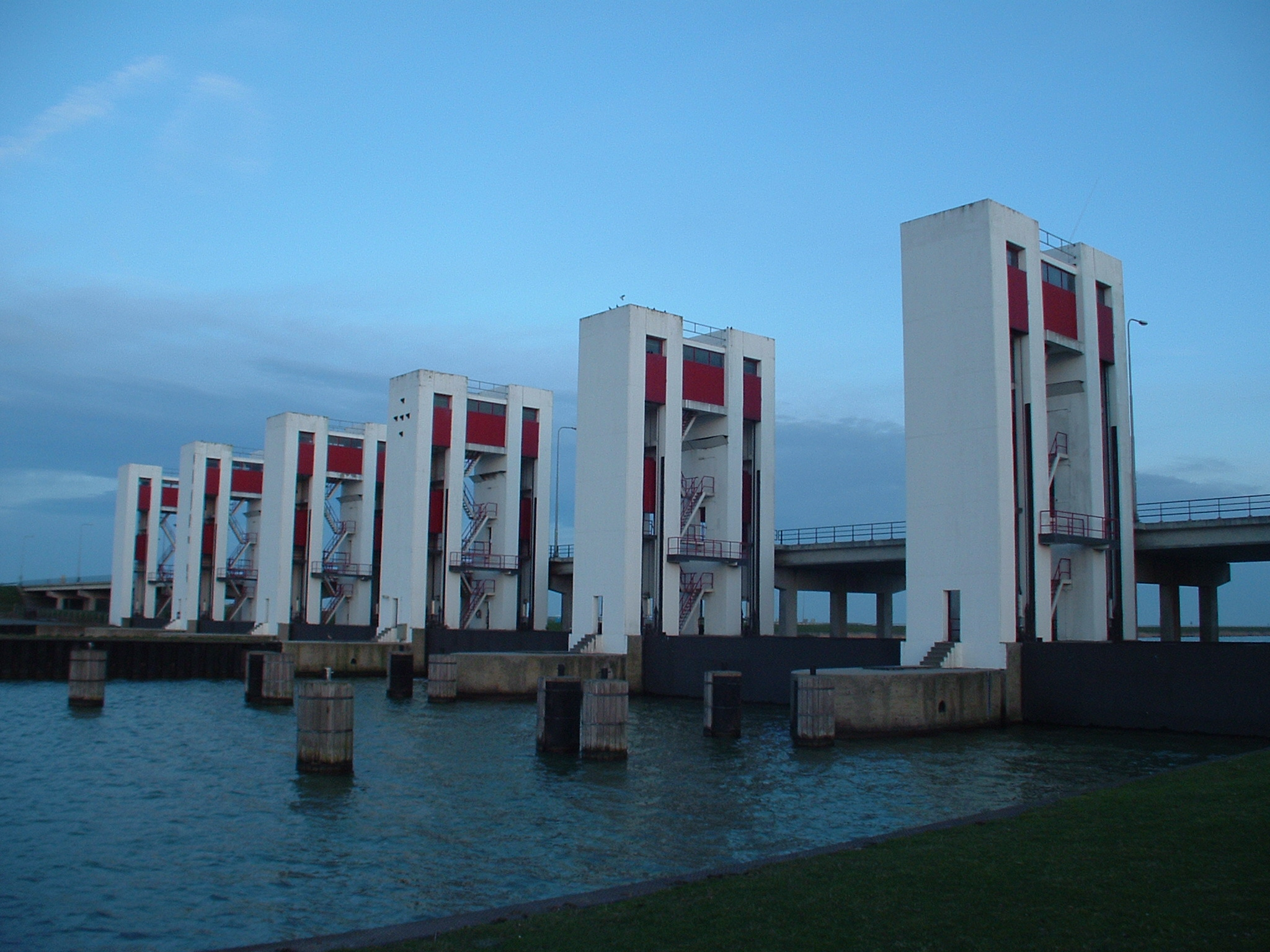 Houtribsluis in de Houtribdijk (Markerwaarddijk) te Lelystad Foto: M.P. Tillema